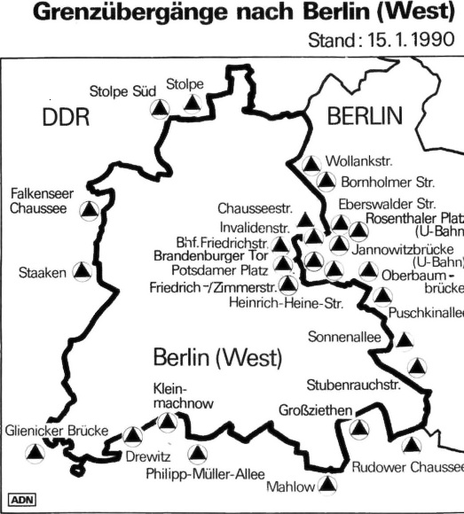 ADN-ZB-Grafik-15.1.90-wü- Berlin: Grenzübergänge zu Berlin (West). Information added by Wikimedia users.Cleaned up PNG version of File:Bundesarchiv_Bild_183-1990-0115-017,_Berlin,_Übersicht_Grenzübergänge.jpg